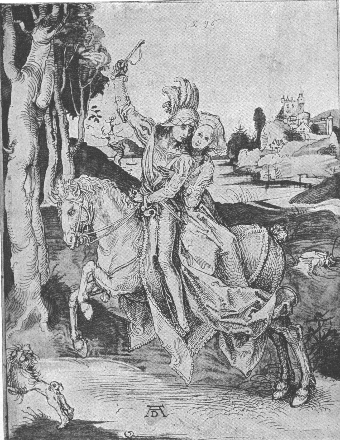 Spazierritt. Faksimile einer Zeichnung von 1496. Berlin, Königliches Kupferstichkabinett